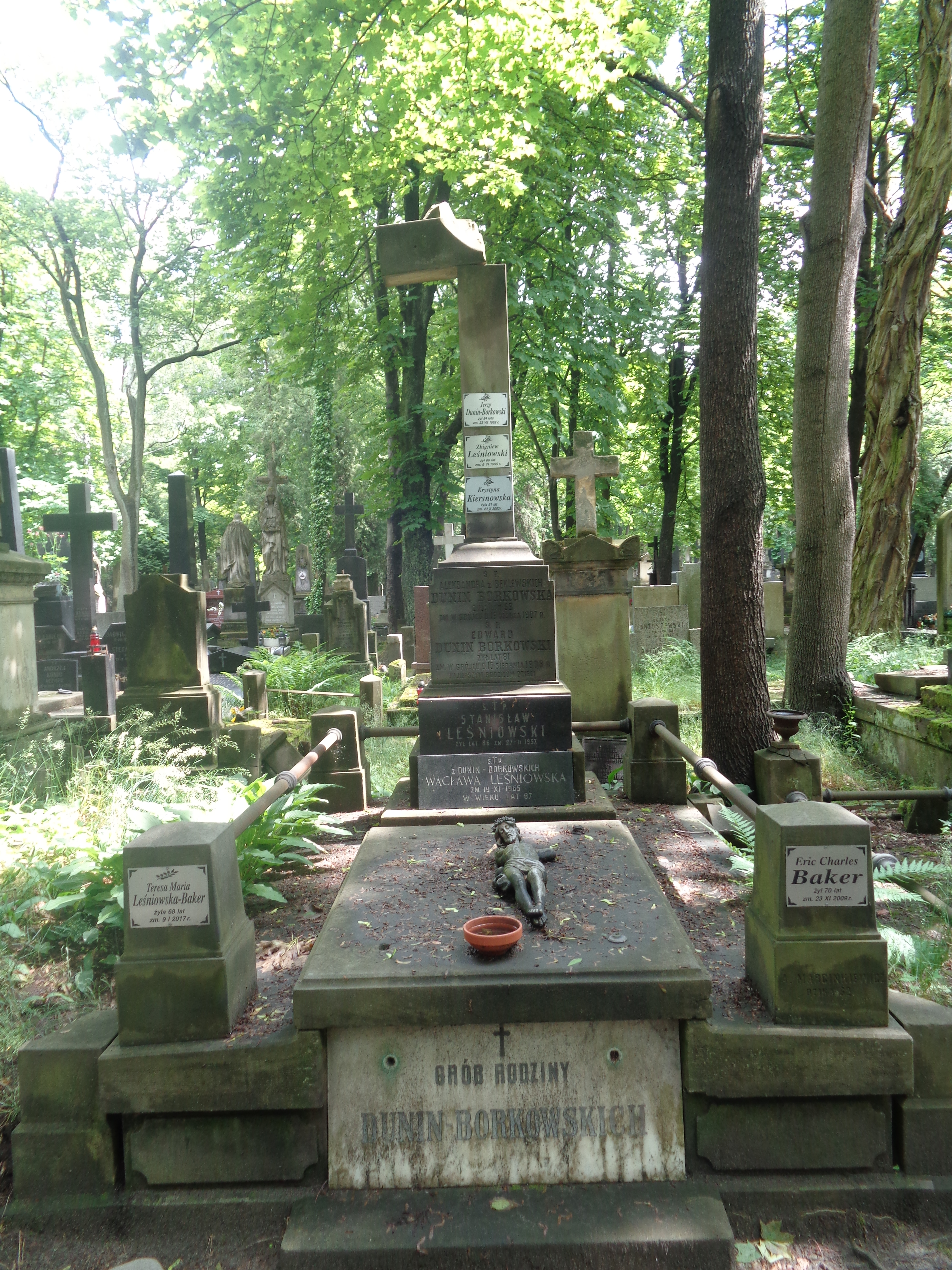 Grób Jerzego Dunin-Borkowskiego i Stanisława Leśniowskiego na Cmentarzu Powązkowskim